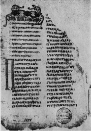 Hilandarski listići, najstariji srpski rukopis, knjiga